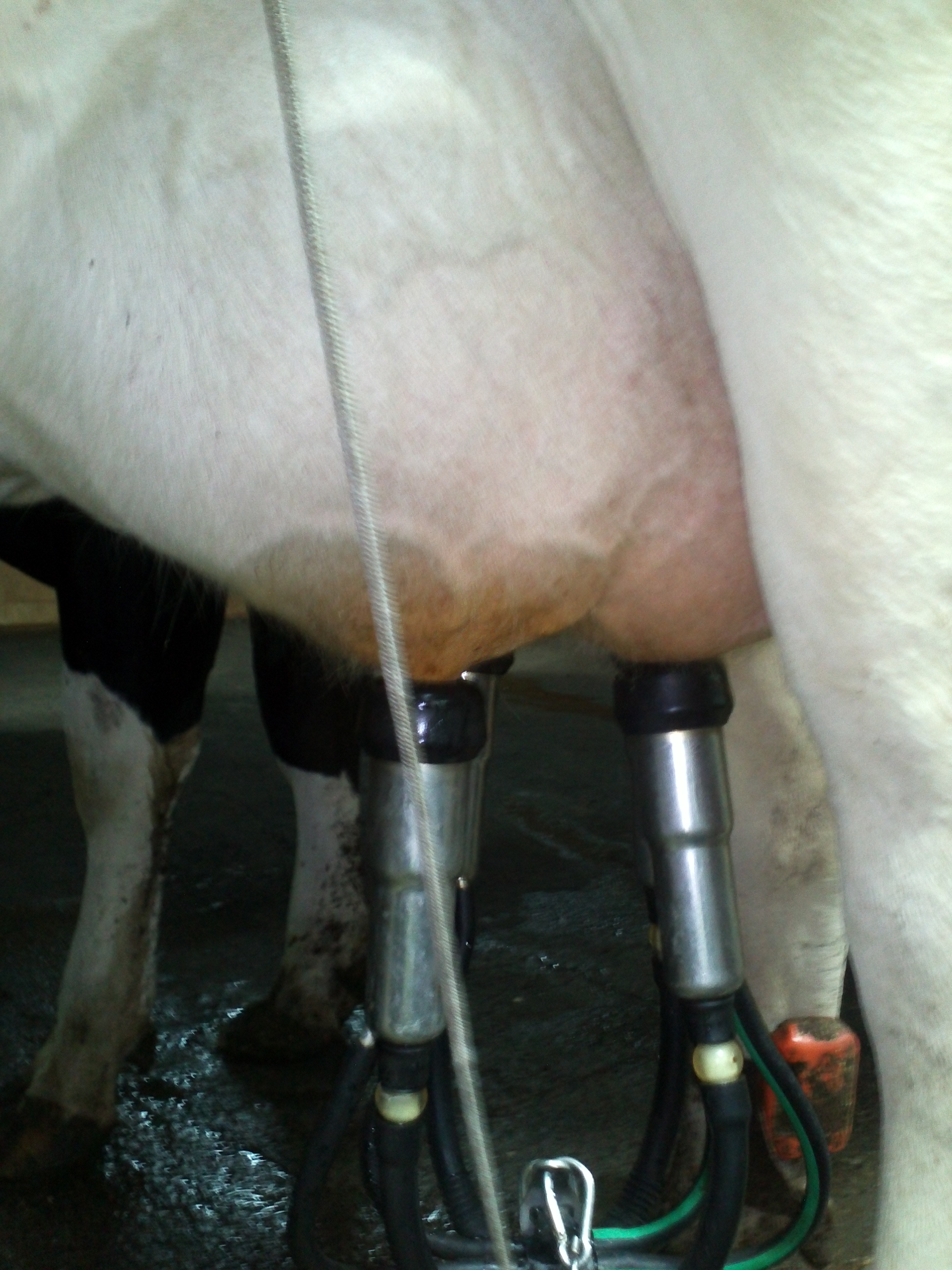 Машинная доилка в киббуце Гезер, Израиль.